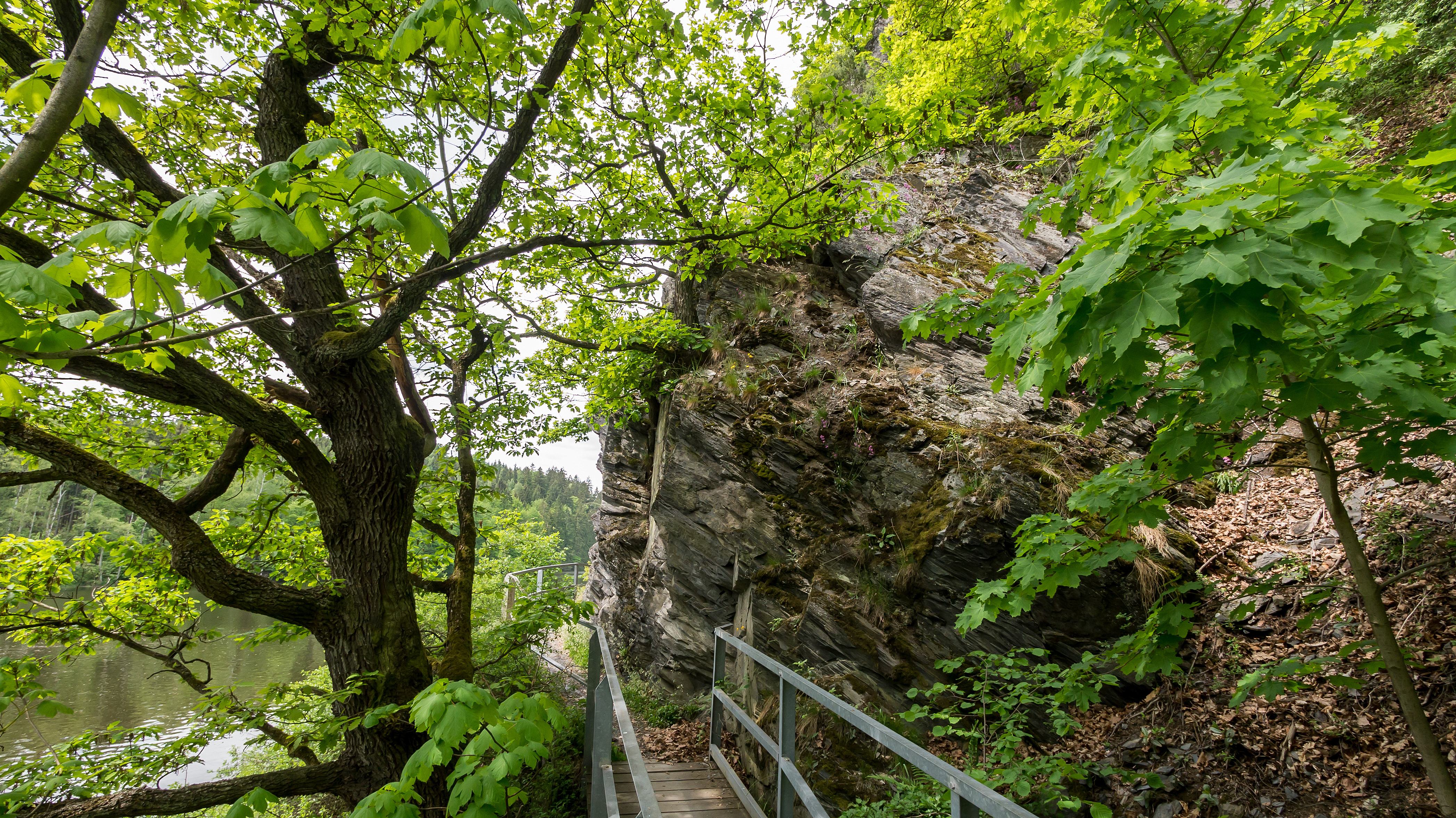 Silikatfelsen mit Felsspaltenvegetation im Naturschutzgebiet „Kobersfelsen“ in Burgk (Thüringen); auch gelegen im FFH-Gebiet „Burgk-Bleiberg-Kobersfelsen“ und im Landschaftsschutzgebiet „Obere Saale“; LXXIII